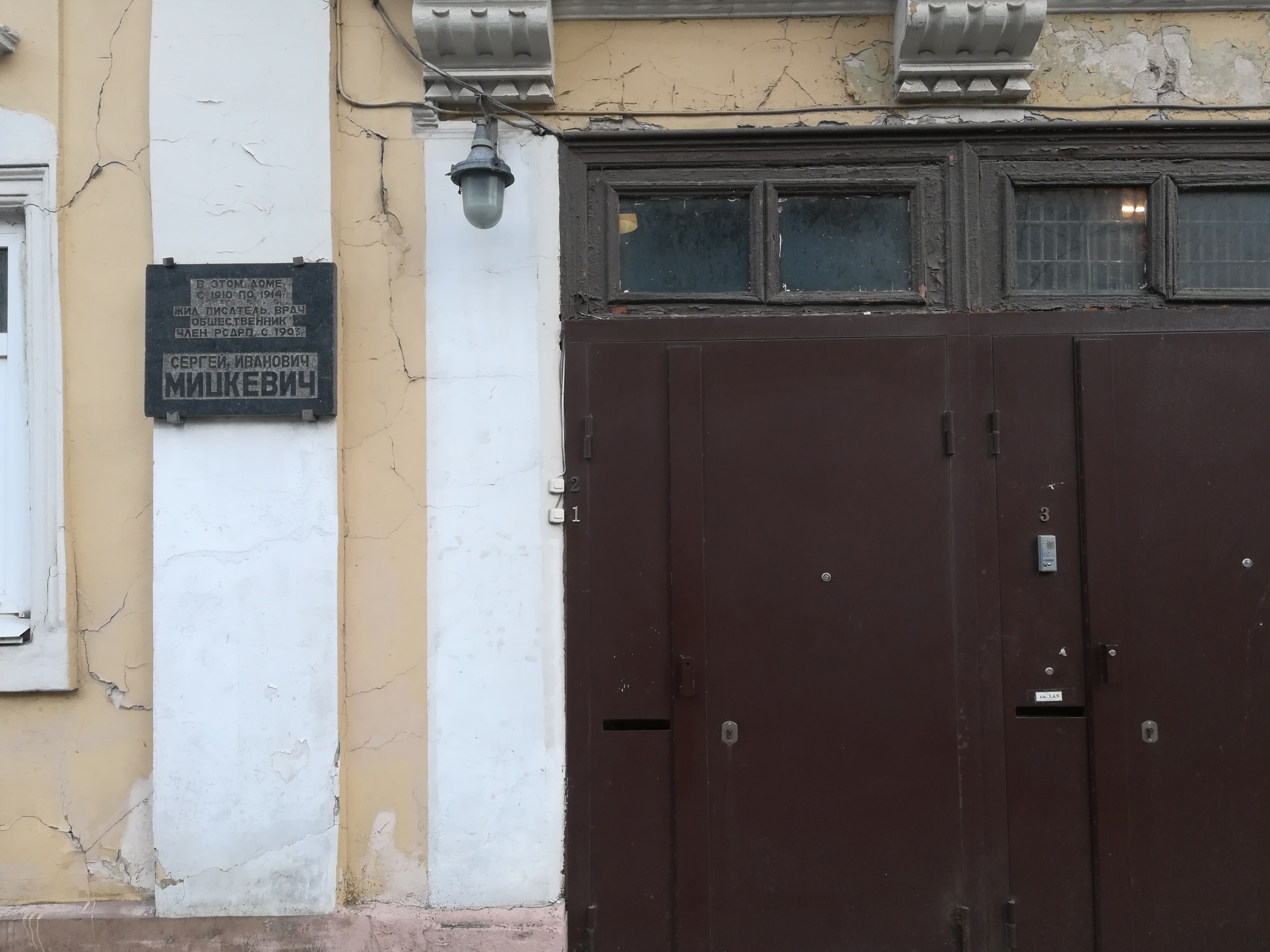 Улица Ульянова